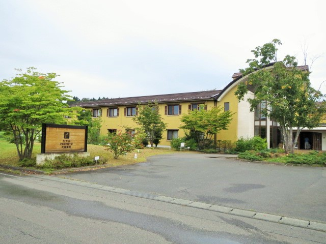 フォルクローロ花巻東和 Canon IXY 3